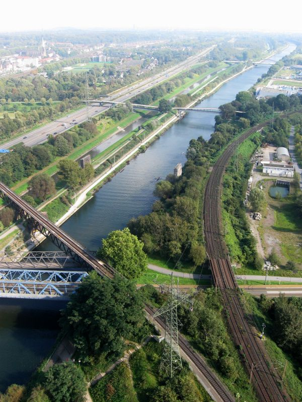 Rhein-Herne-Kanal mit Bahnstrecken, Blick vom Gasometer